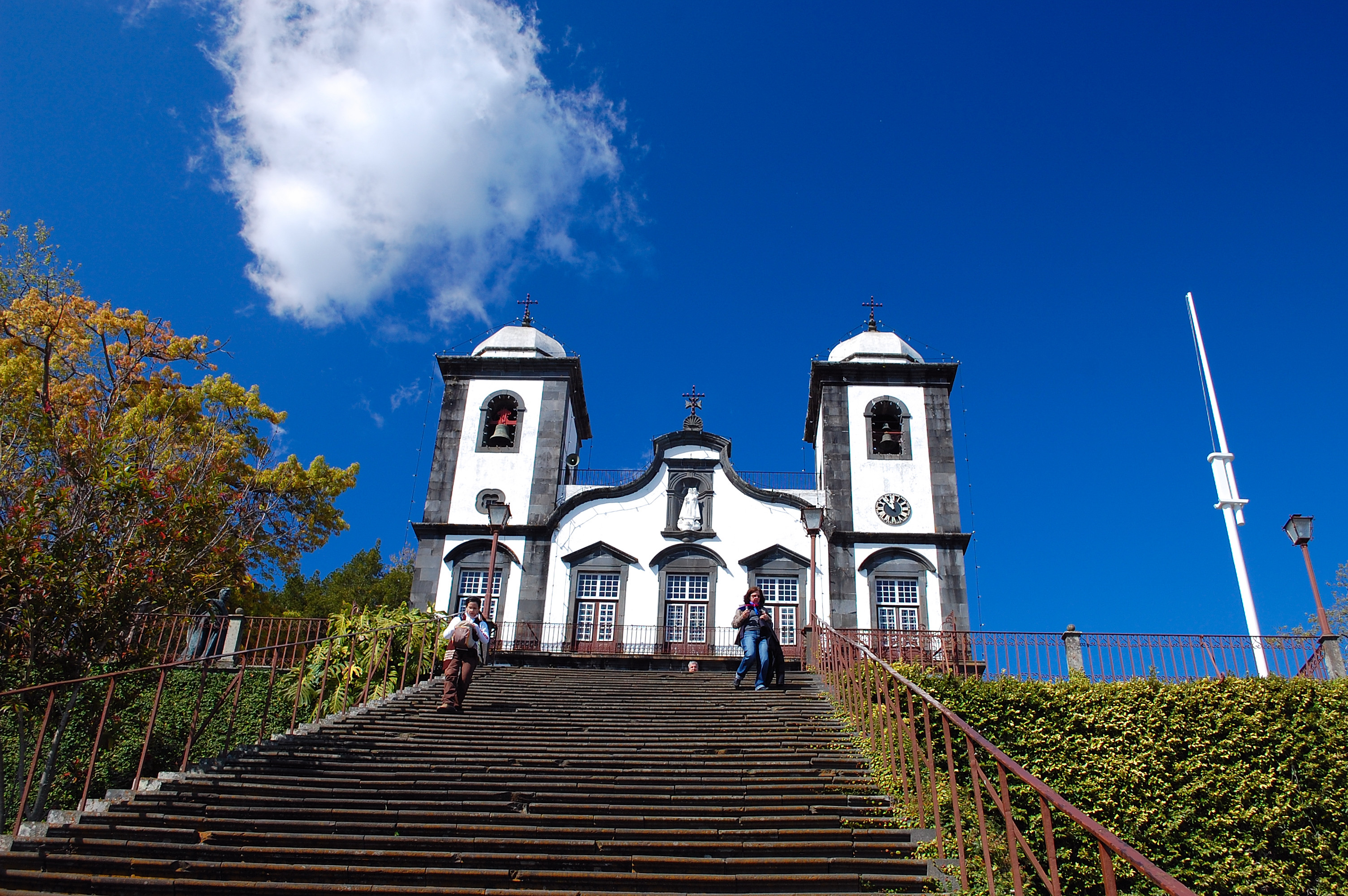 Nossa Senhora (Our Lady) Church, Monte.